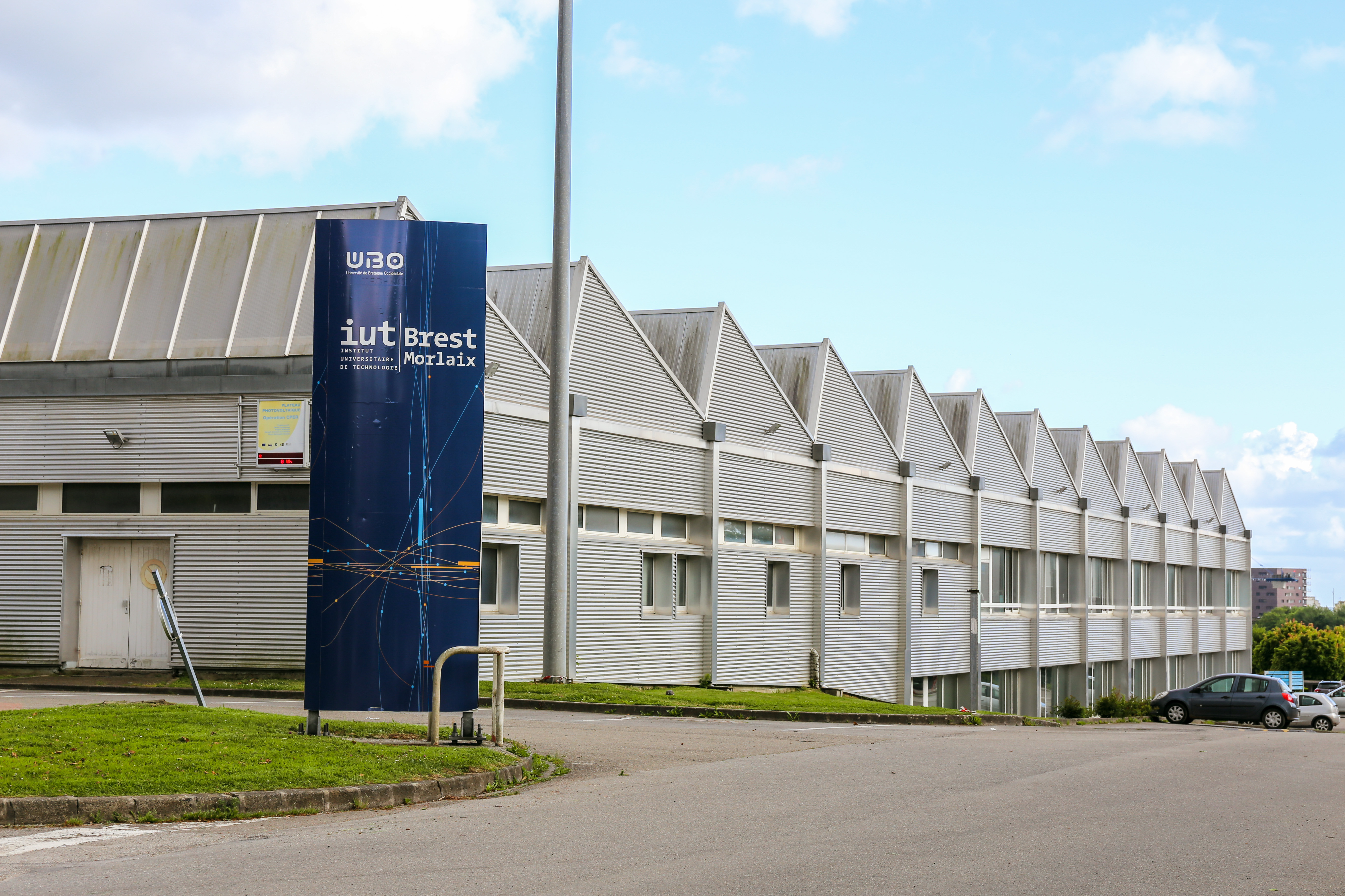 L'Institut Universitaire de Technologie (IUT) de Brest et Morlaix à l'Université de Bretagne Occidentale (UBO).